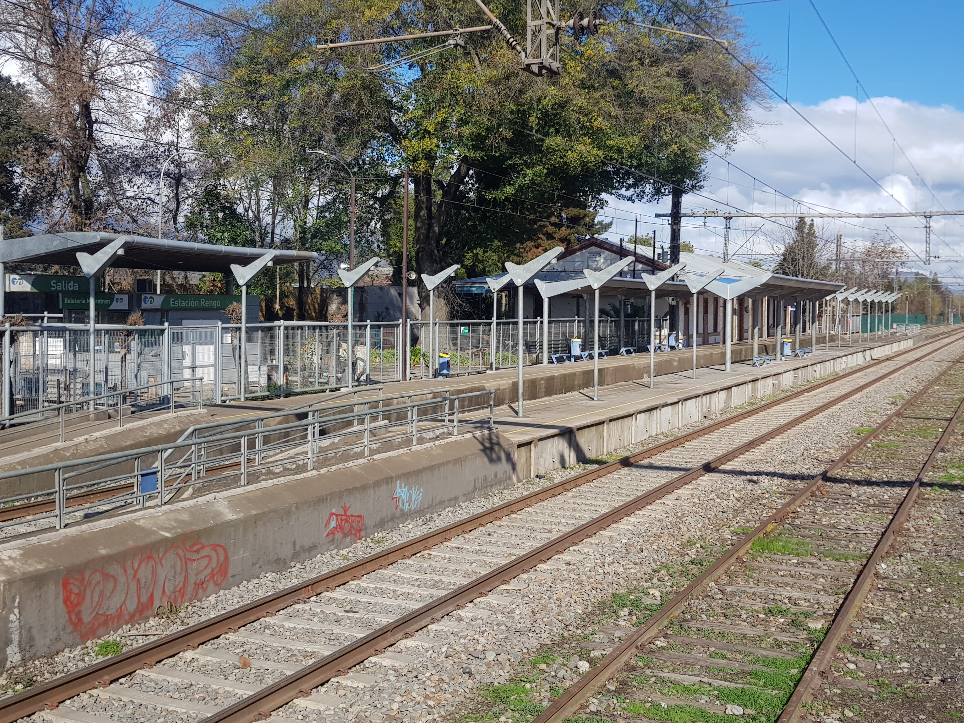 Estación de ferrocarriles de Rengo en 2017